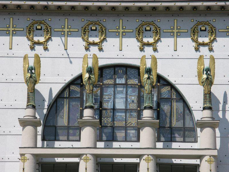 Engelfiguren der Otto Wagnerkirche am Lemoni-Berg, Aussenaufnahme, 2012